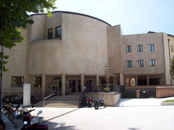 Pordenone-Palazzo della Provincia